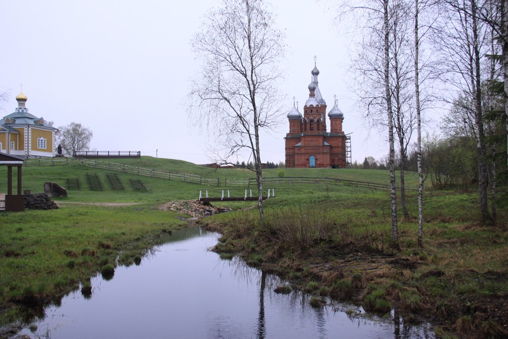 Панорама Истока Волги